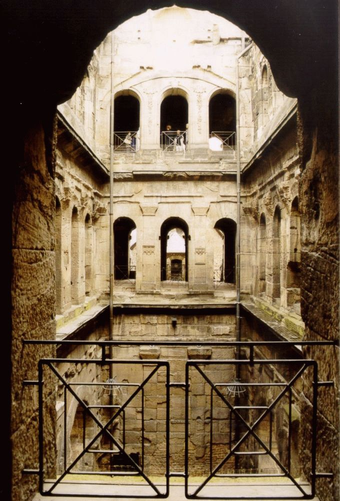 Beschreibung: Porta Nigra in Trier, Blick in den Innenhof von der 1. Etage aus Quelle: Fotografiert am 17. Mai 2003 Fotograf: Stefan Kühn